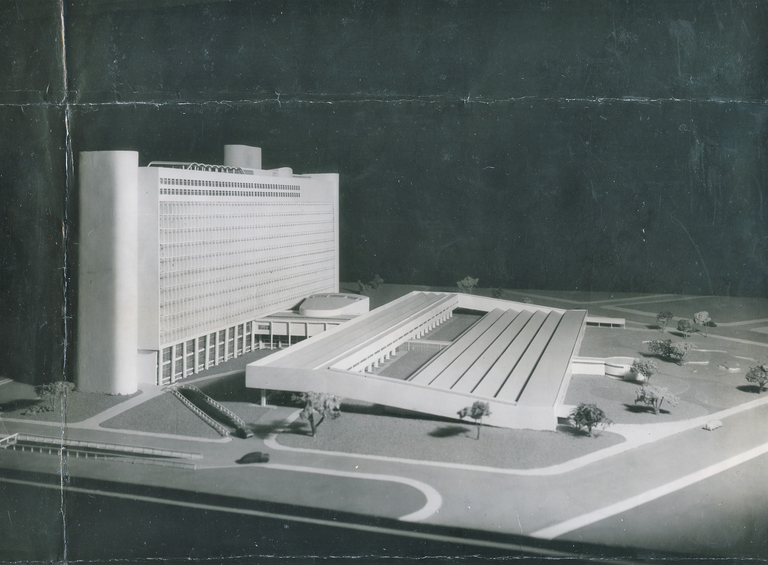 Fotografia do Fundo Correio da Manhã, sob a guarda do Arquivo Nacional.